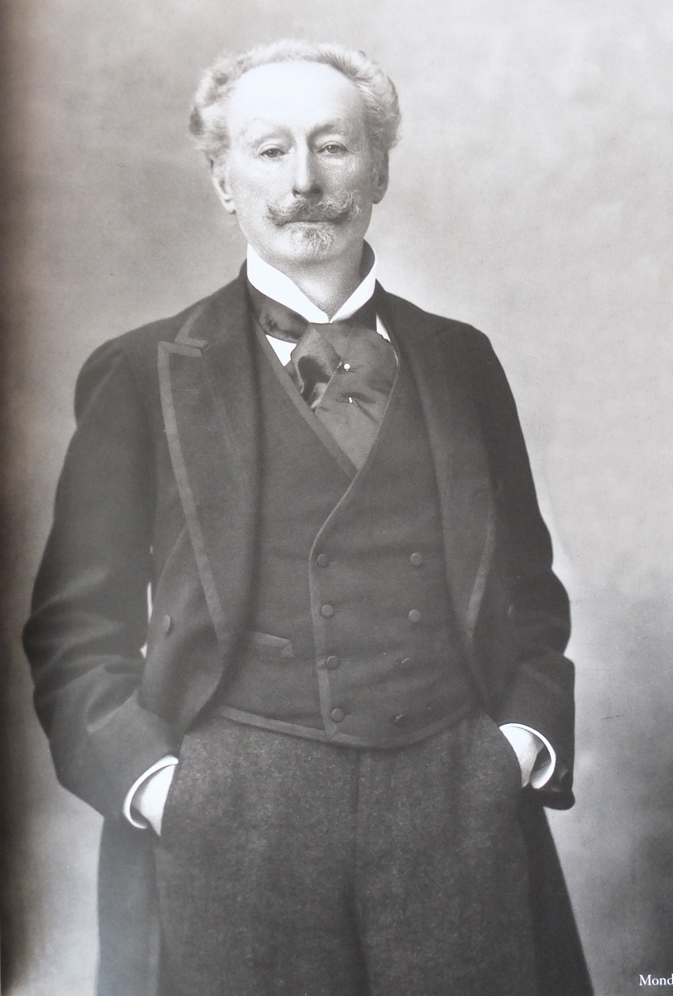 Charles Haas (1833-1902), photographié par Paul Nadar le 26 décembre 1895.